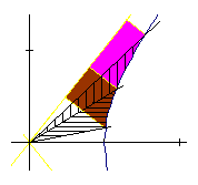 Schema hyperboolsegmenten